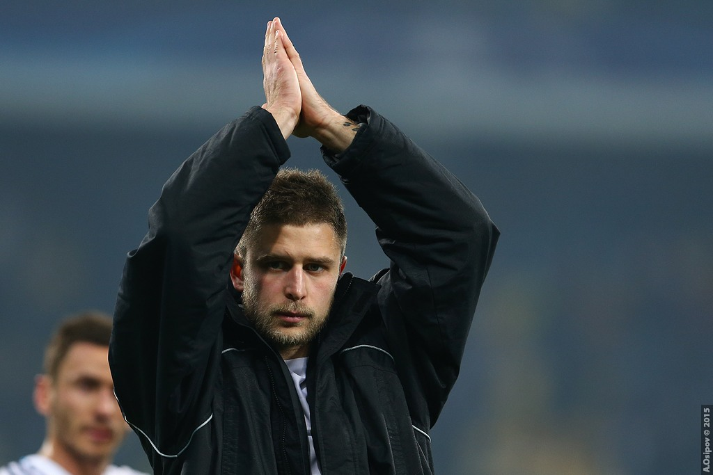 20.10.2015 Kyiv, Olimpiyskiy National Sports Complex Champions League. Group stage. FC Dynamo Kyiv - Chelsea - 0:0 Chelsea (4-2-3-1): Begovic; Zouma, Cahill, JT (c), Azpilicueta; Ramires, Matic; Willian, Fabregas (Oscar 75), Hazard; Diego Costa. Unused subs Blackman, Baba, Mikel, Traore, Kenedy, Falcao. Booked Zouma 67 Dynamo Kiev (4-1-4-1): Shovkovskiy; Danilo Silva, Khacheridi, Dragovic, Vida; Rybalka; Yarmolenko, Sydorchuk, Buyalskiy (Garmesh 83), Gonzalez; Kravets (Junior Moraes 78). Unused subs Rybka, Antunes, Petrovic, Gusev, Miguel Veloso. Booked Buyalskiy 65 20.10.2015 г.Киев. НСК "Олимпийский". Лига Чемпионов. Групповой этап Динамо — Челси 0:0 Динамо: Шовковский — Данило Силва, Драгович, Хачериди, Вида — Рыбалка, Буяльский (Гармаш, 83) — Ярмоленко, Сидорчук, Гонсалес — Кравец (Мораес, 78) Челси: Бегович — Аспиликуэта, Терри, Кэхилл, Зума — Матич, Рамирес — Виллиан, Фабрегас (Оскар, 75), Азар — Д. Коста Предупреждения: Буяльский — Зума